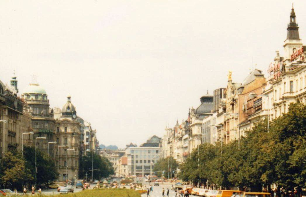 Prag (August 1984): Václavské Náměstí (Wenzelsplatz), der Hauptboulevard (vom Nationalmuseum aus gesehen) sowie das Kultur-, Geschäfts- und Gesellschaftszentrum der Stadt, mit Hotels, Restaurants, Banken und Unterhaltungsstätten.